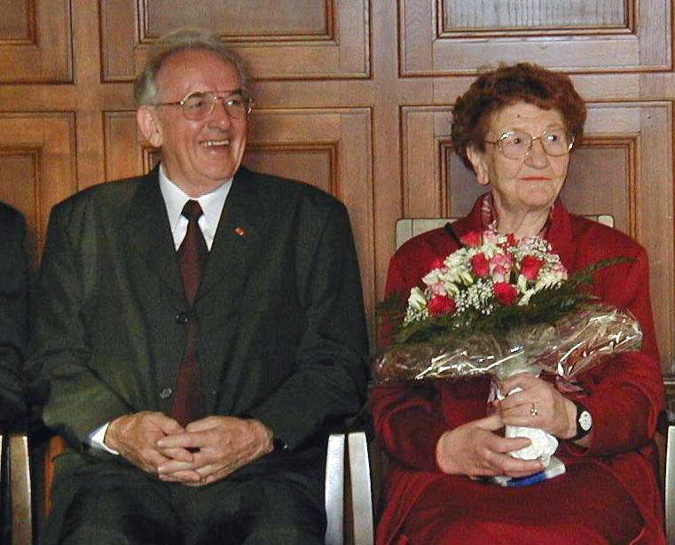 Hans-Günter und Ehefrau Elli Eckerth 11/2000 bei seinem 75. Geburtstag im Bürgerhaus Hilden